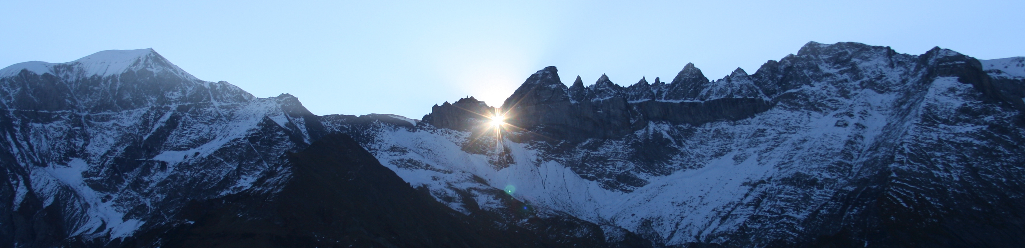 Zweimal jährlich scheint die Frühlings- und Herbstsonne durch das Martinsloch. Die Elmer Dorfkirche wird dabei nur an bestimmten Tagen, nämlich um den 11. März und den 1. Oktober herum vom Lichtkegel getroffen.